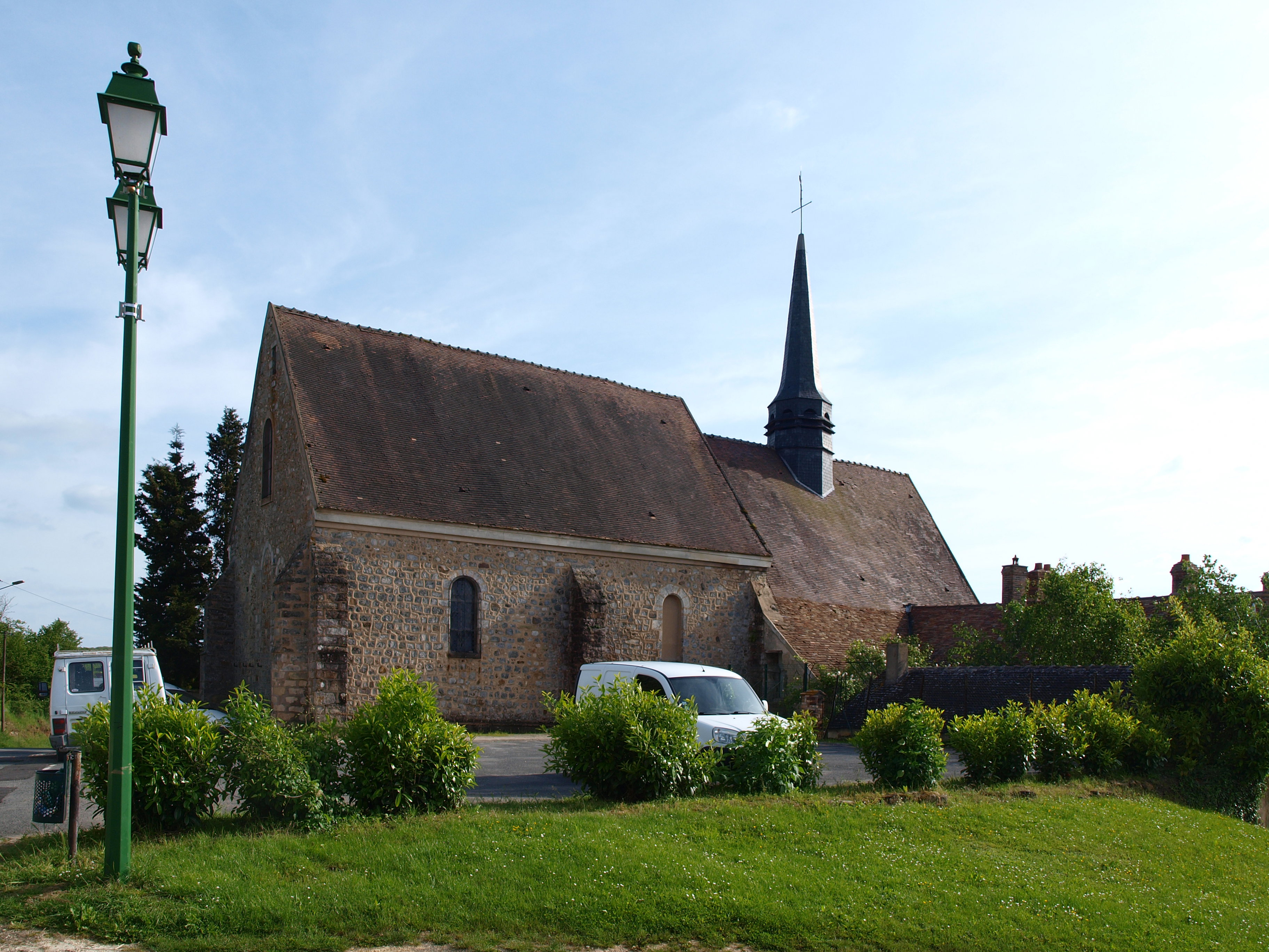 Saint-Agnan (Yonne, France)